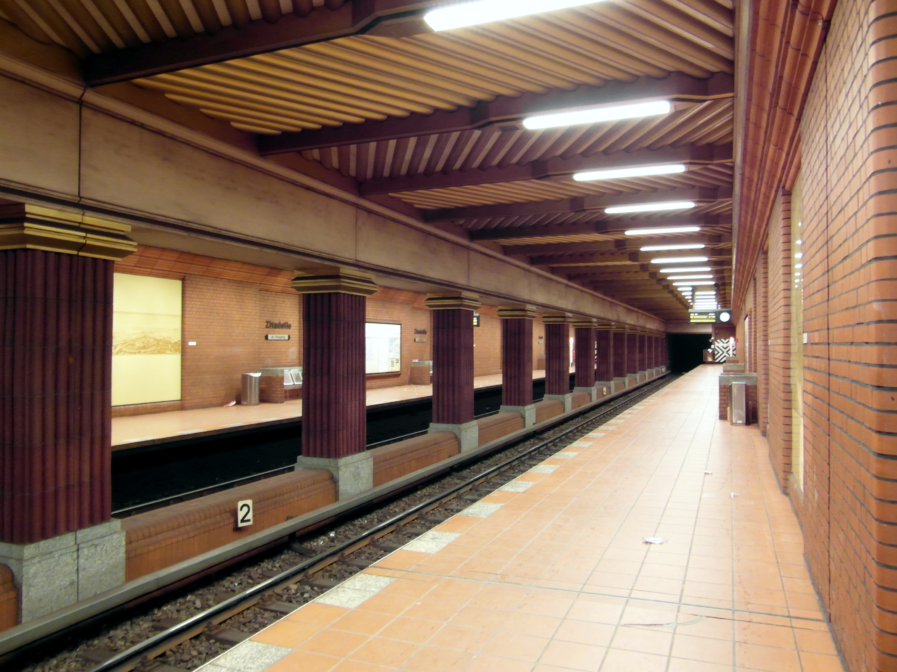 Linie U7